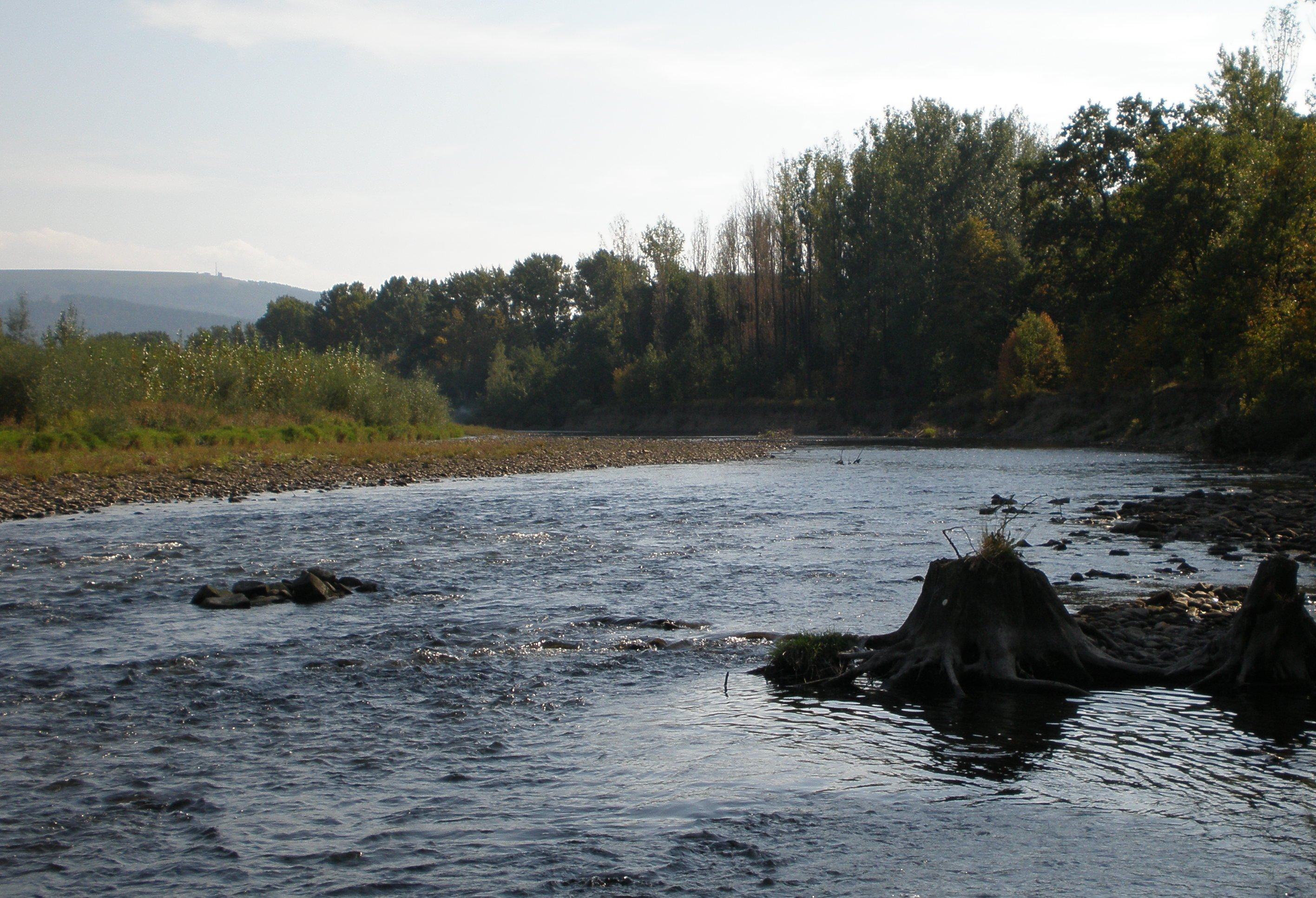 Soła w Kobiernicach